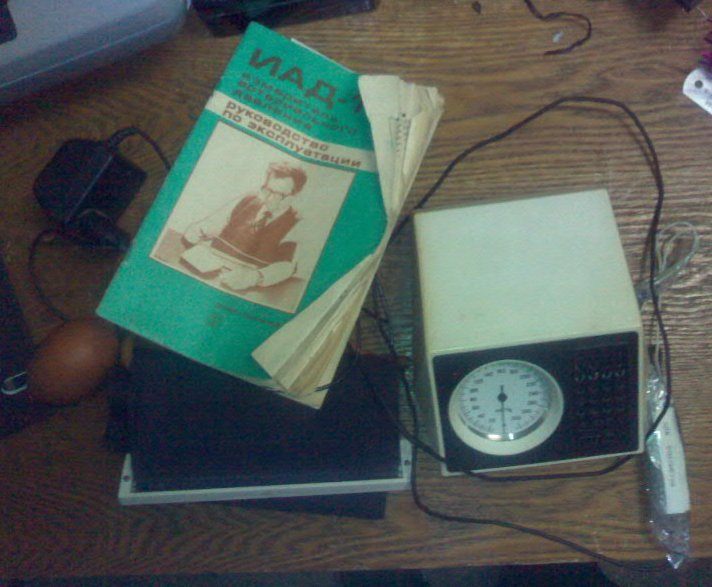 Тонометр-полуавтомат "Электроника ИАД-1". 1986 год. "Заряжало" в качестве БП - моё творчество. "Штука, замотанная в скотч" - конденсатор фильтра. "Заряжало" выдаёт нефильтрованное напряжение. В отличие от современных тонометров, которые "слышат" тоны Короткова через шланг, у этого датчик встроен в манжёту и подключается отдельным кабелем. Имеет пневмовыключатель, автоматически подающий питание при наличии давления в шланге. Исправен.